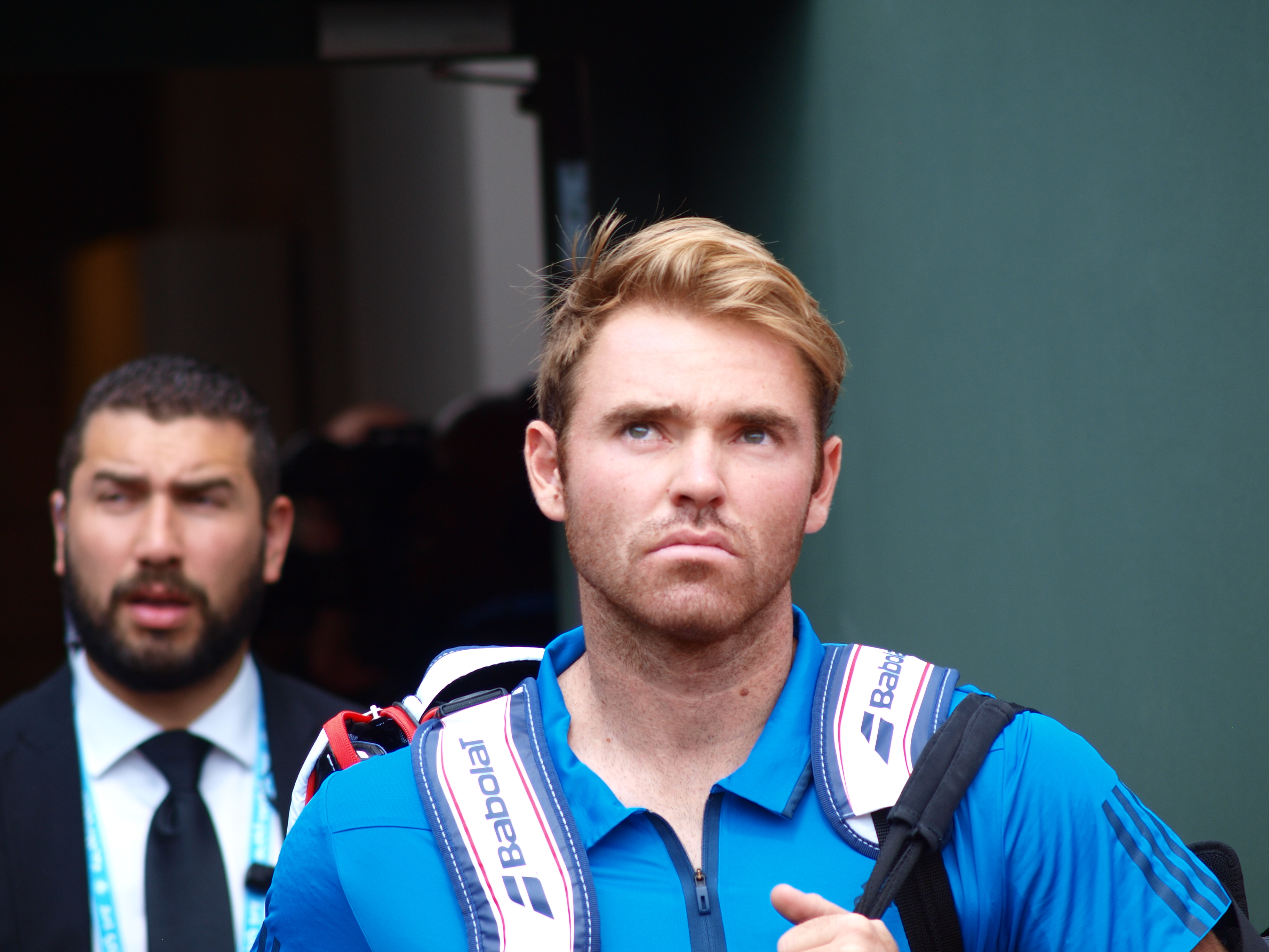 Le joueur de tennis américain Bjorn Fratangelo, lors des internationaux de France de tennis, sur le stade Roland Garros, à Paris, le 25 mai 2016, dans son duel sportif contre le joueur français Richard Gasquet.